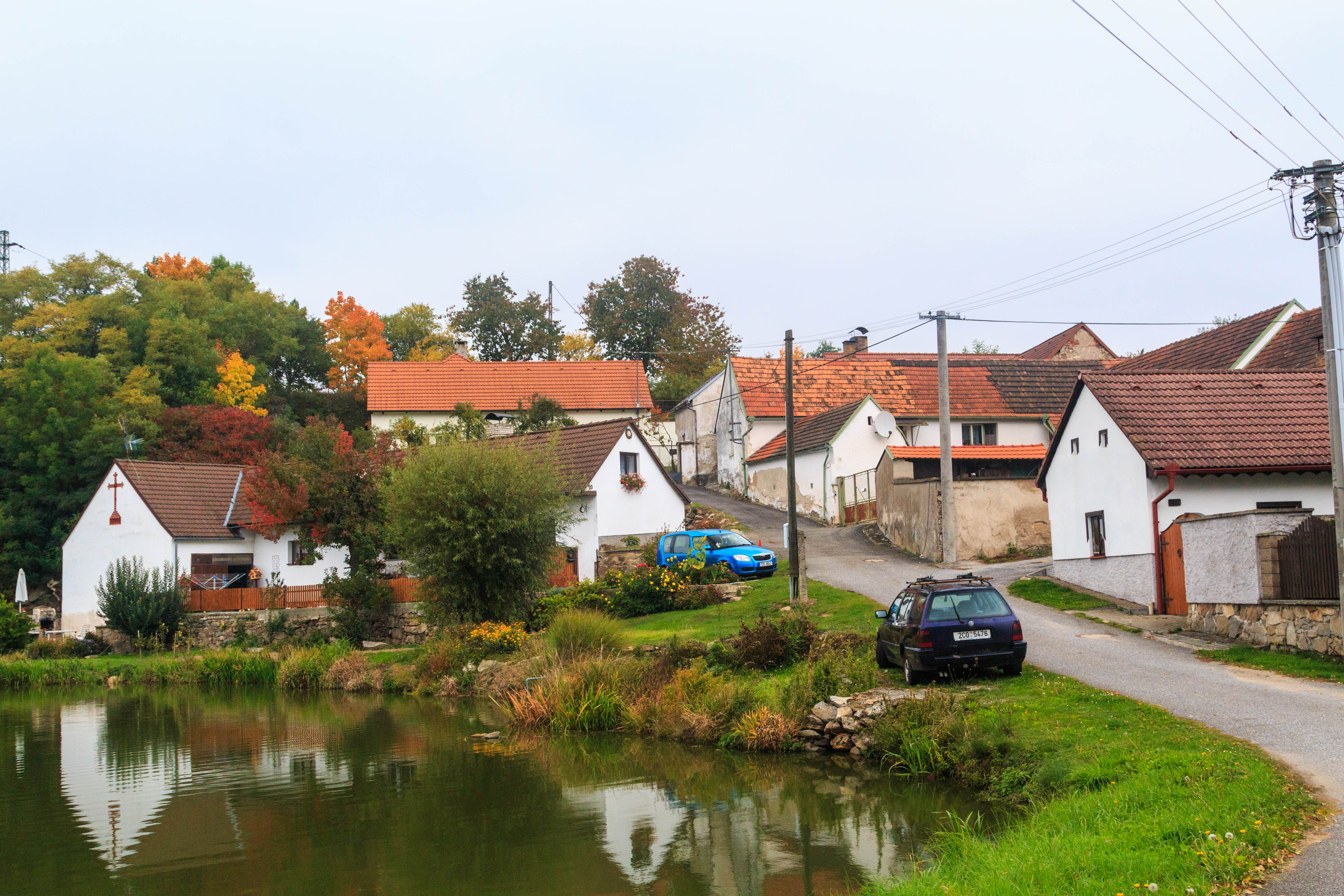 Rojice - čp. 17